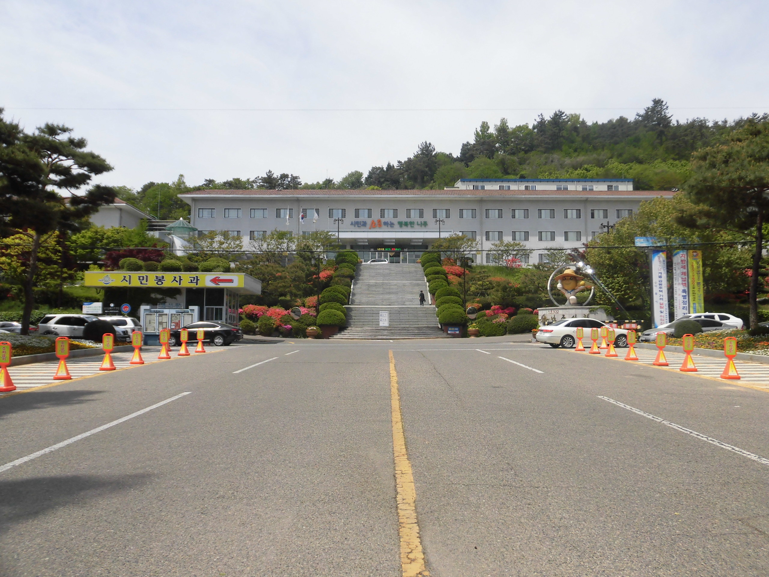 전라남도 나주시에 있는 나주시청